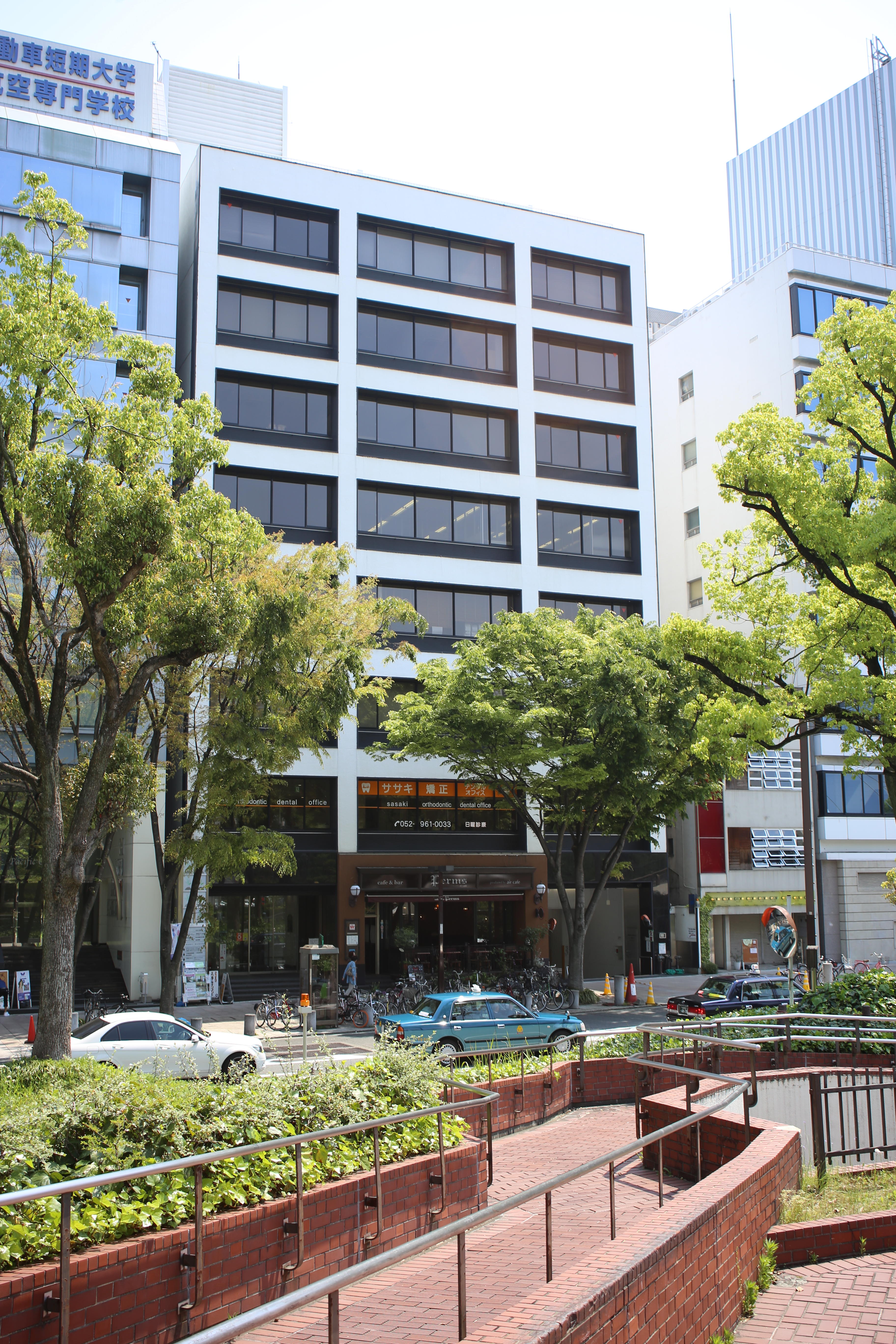 名古屋市東区泉一丁目のNBN泉ビルを西側公道北側より撮影